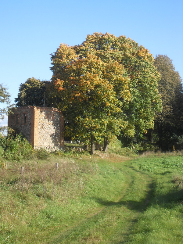 Сурвілішкі. Званіца на могілках